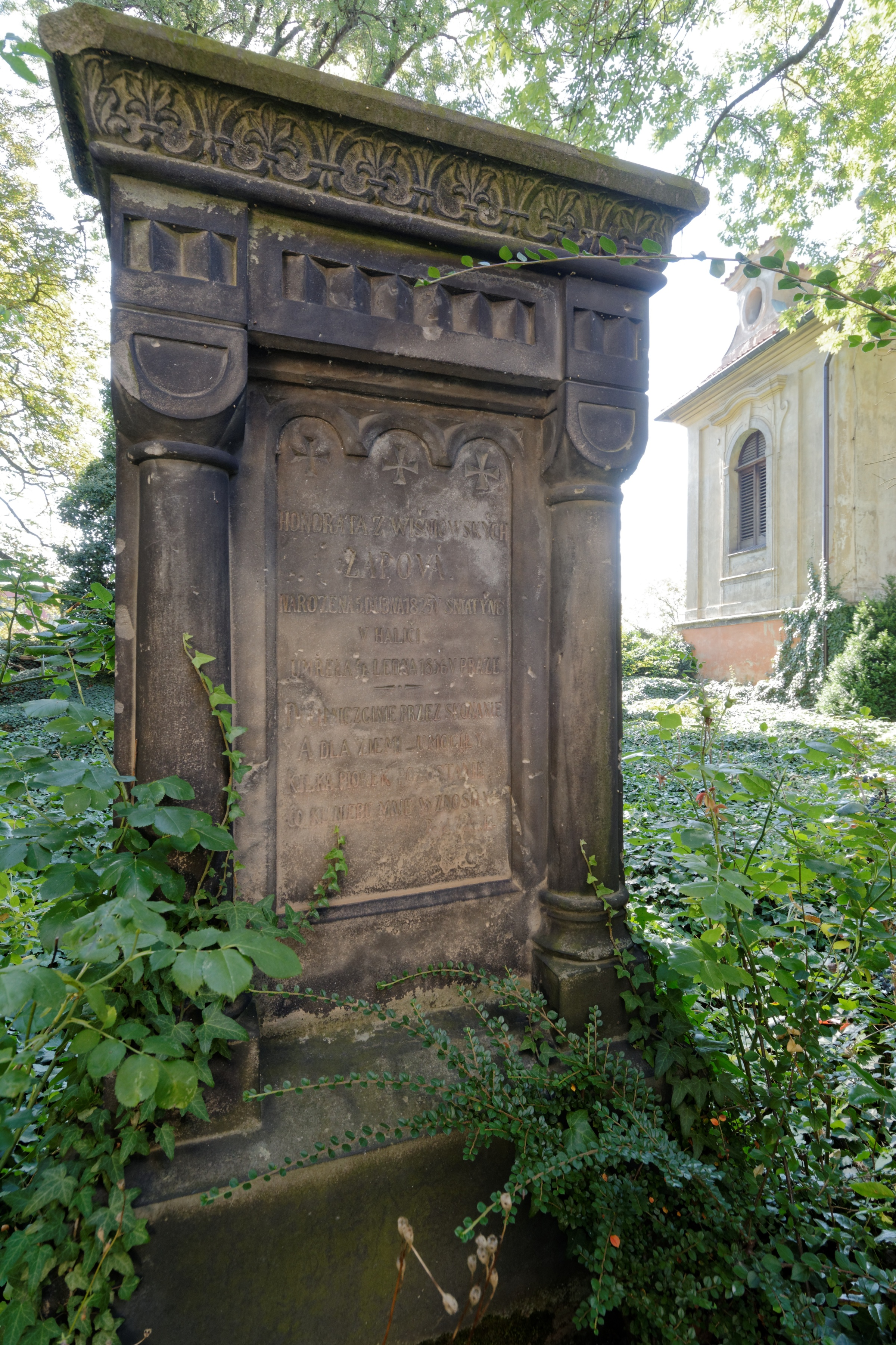 Kostel svatého Václava, U proseckého kostela, Prosek. Náhrobek Honoraty z Wiśniowskich Zapové (1825 - 1856) text: Honorata z Wiśniowských Zapová narozena 5. dubna 1825 v Sniatyně v Haliči umřela 4. ledna 1856 v Praze Duch nie zginie przez skonanie, A dla ziemi u mogily, Kilka piórek pozostanie, Co k niebu mie, roznosily.